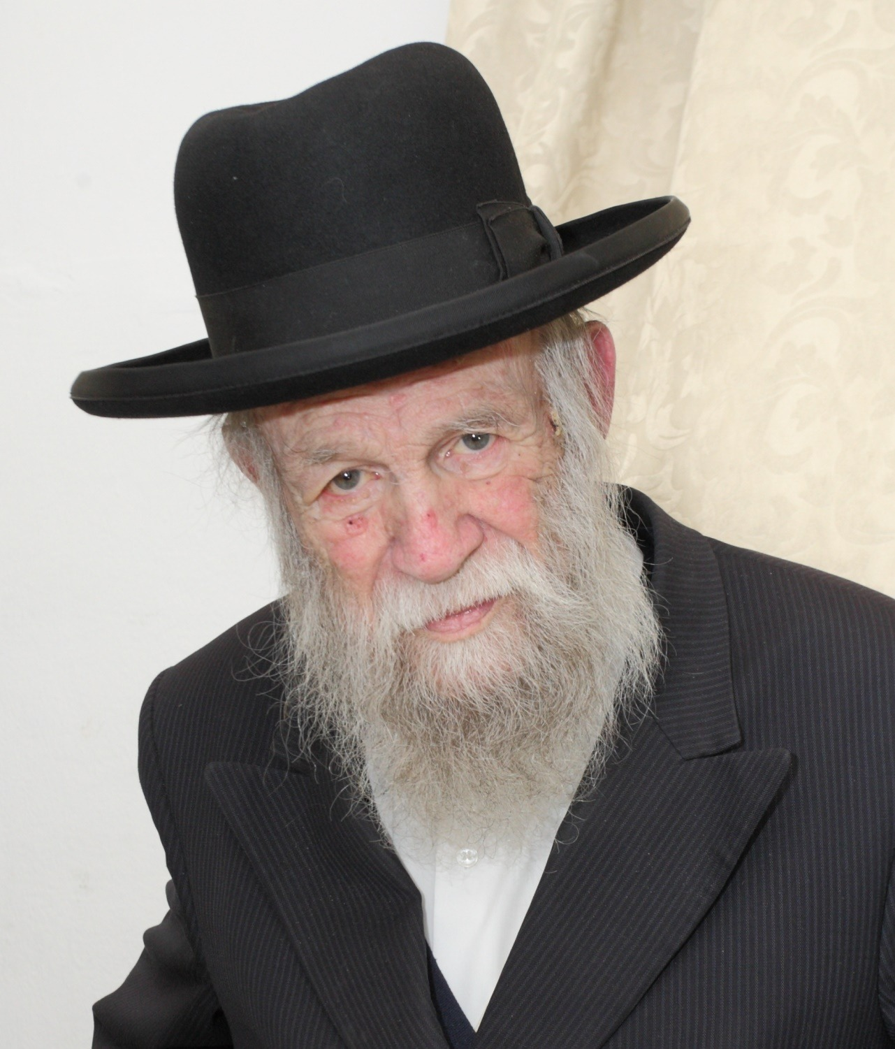 הרב שלמה פפנהיים ז"ל